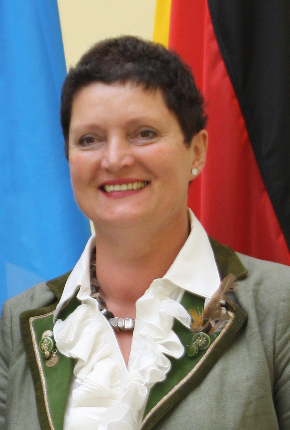 Gertraud Goderbauer, bayerische Politikerin (CSU). Hier während der Verleihung der Kommunalen Verdienstmedaille in Bronze des Bayerischen Staatsministeriums des Innern am 18. Juli 2011 in München